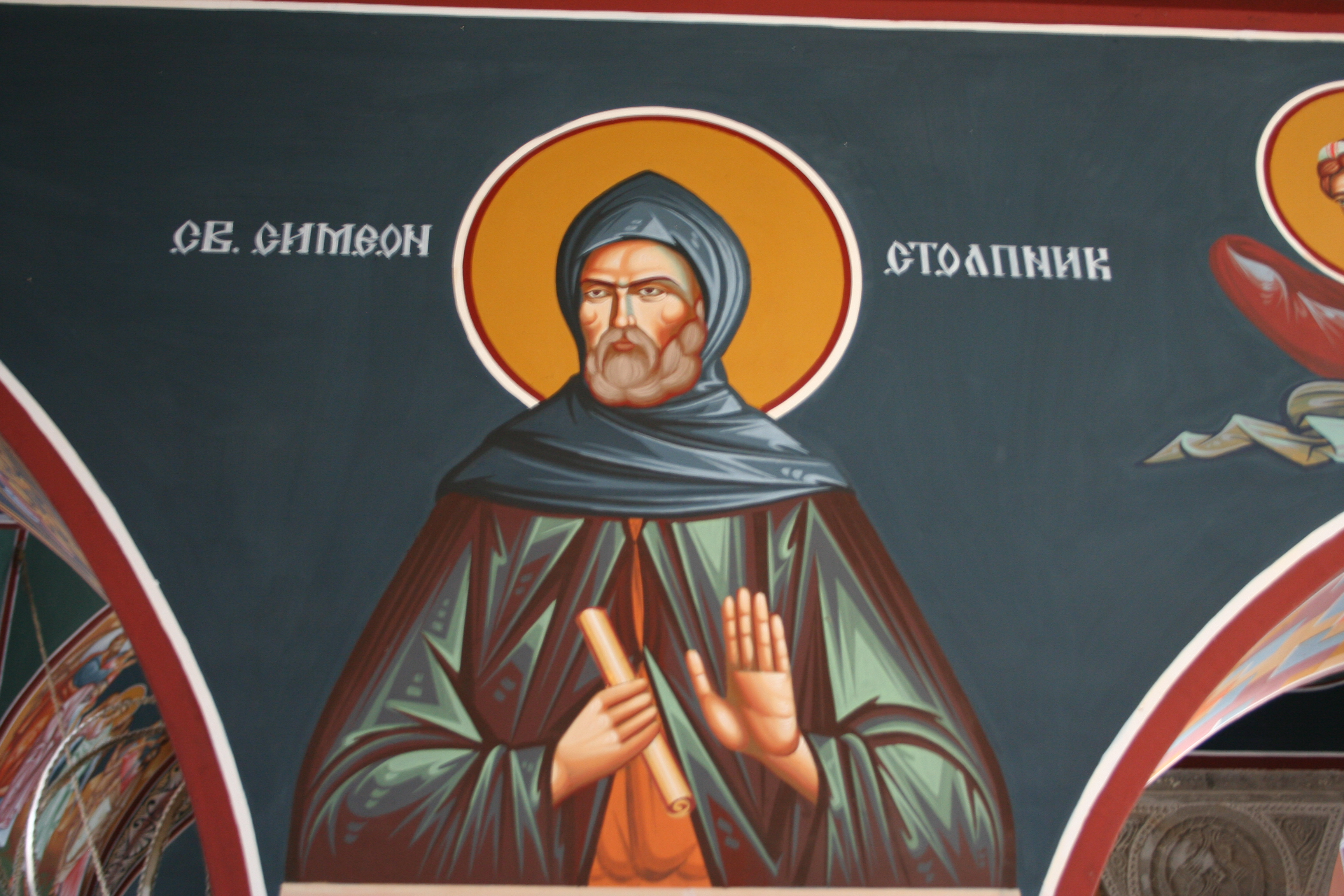 Crkva Sv. Petra i Pavla, Banja Koviljača